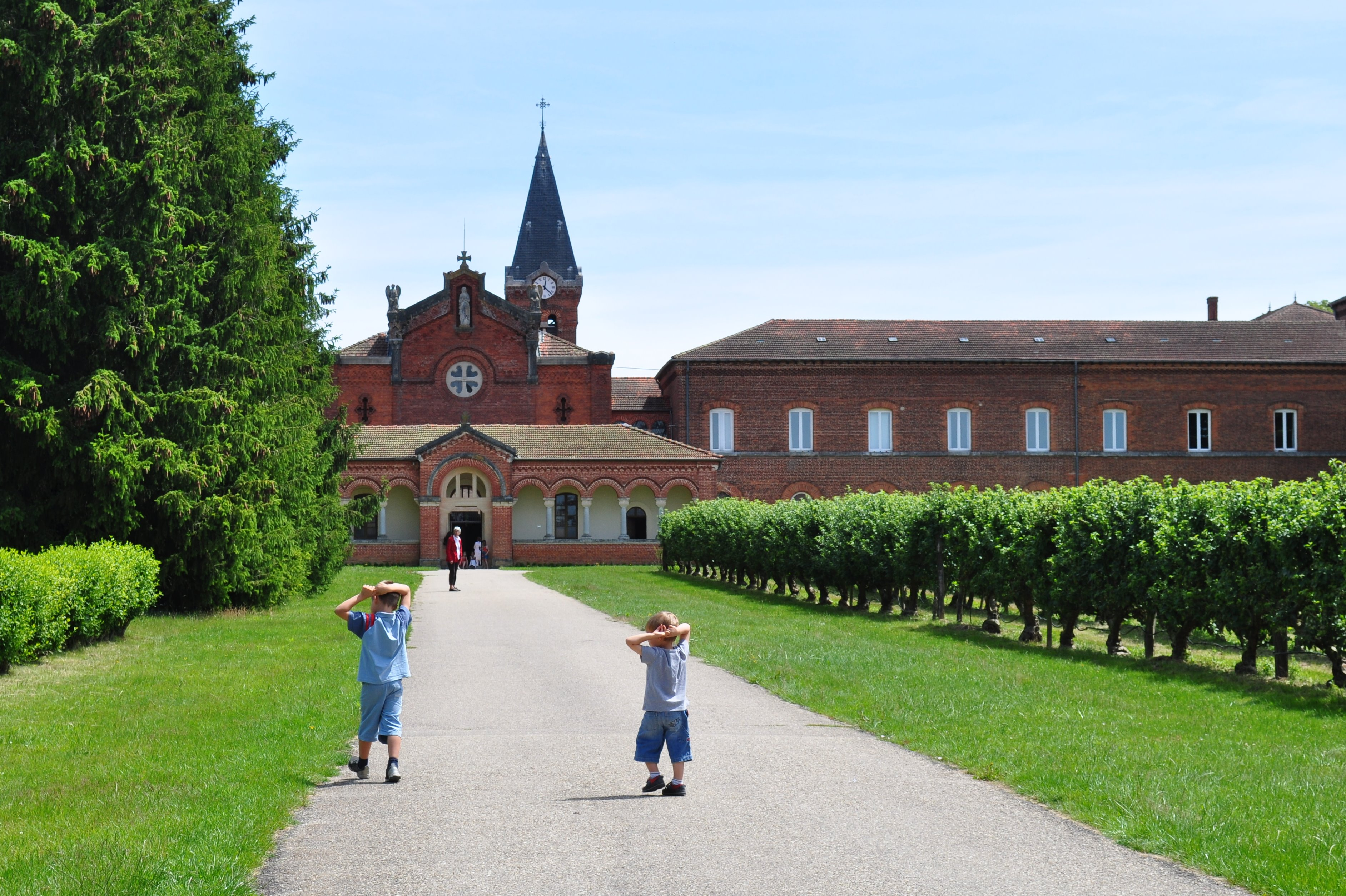 Vue de l'Abbaye Notre-Dame des Dombes, au Plantay, dans l'Ain.